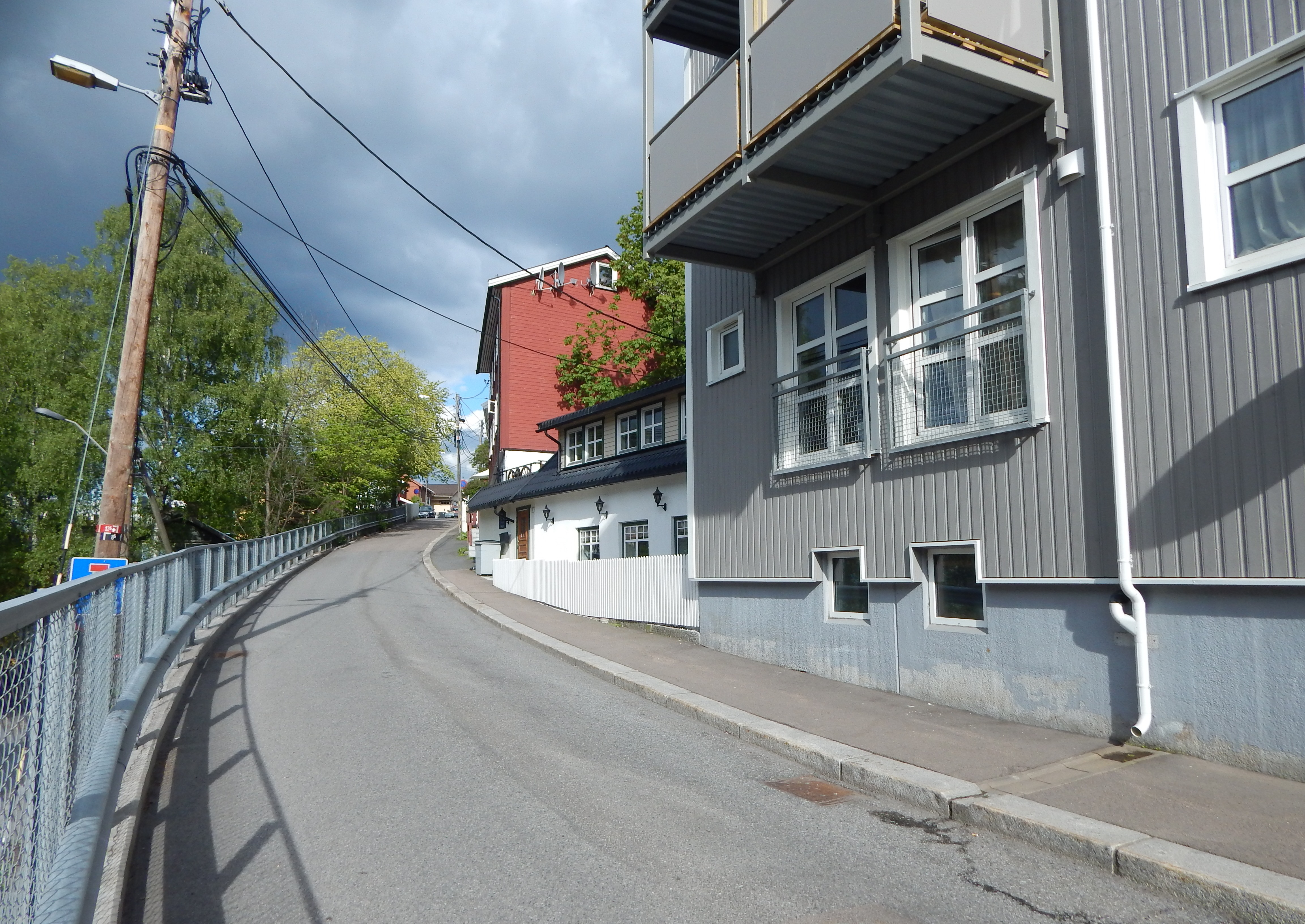 Nedre del av Rynbergveien, like over Konows gate